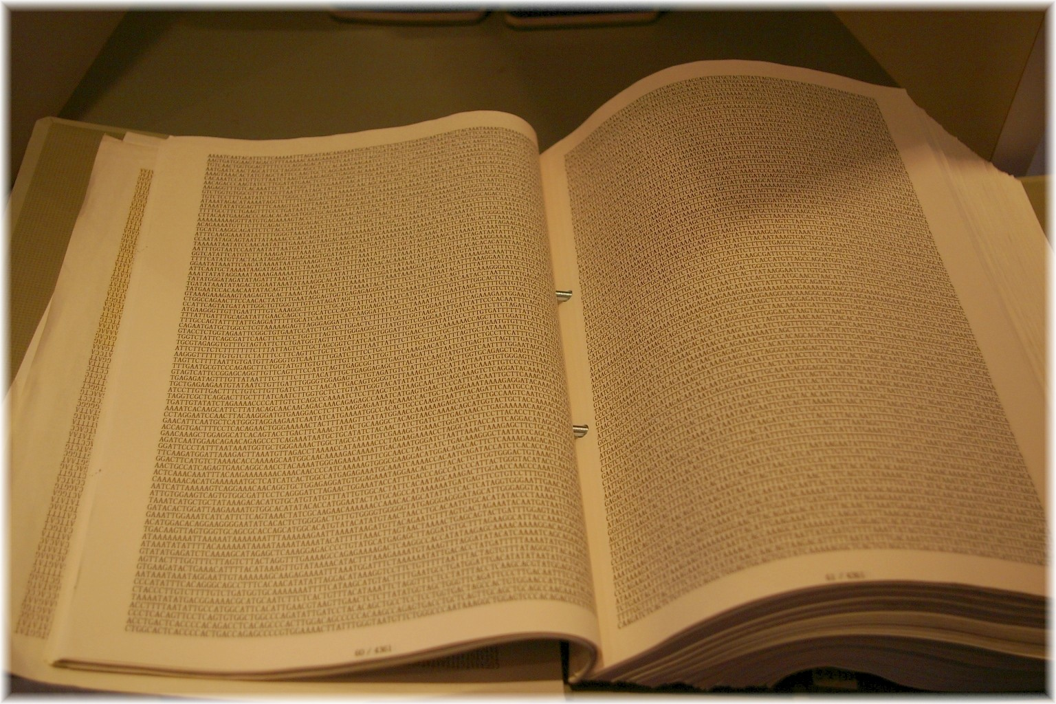 DNA Image noted in a paper.